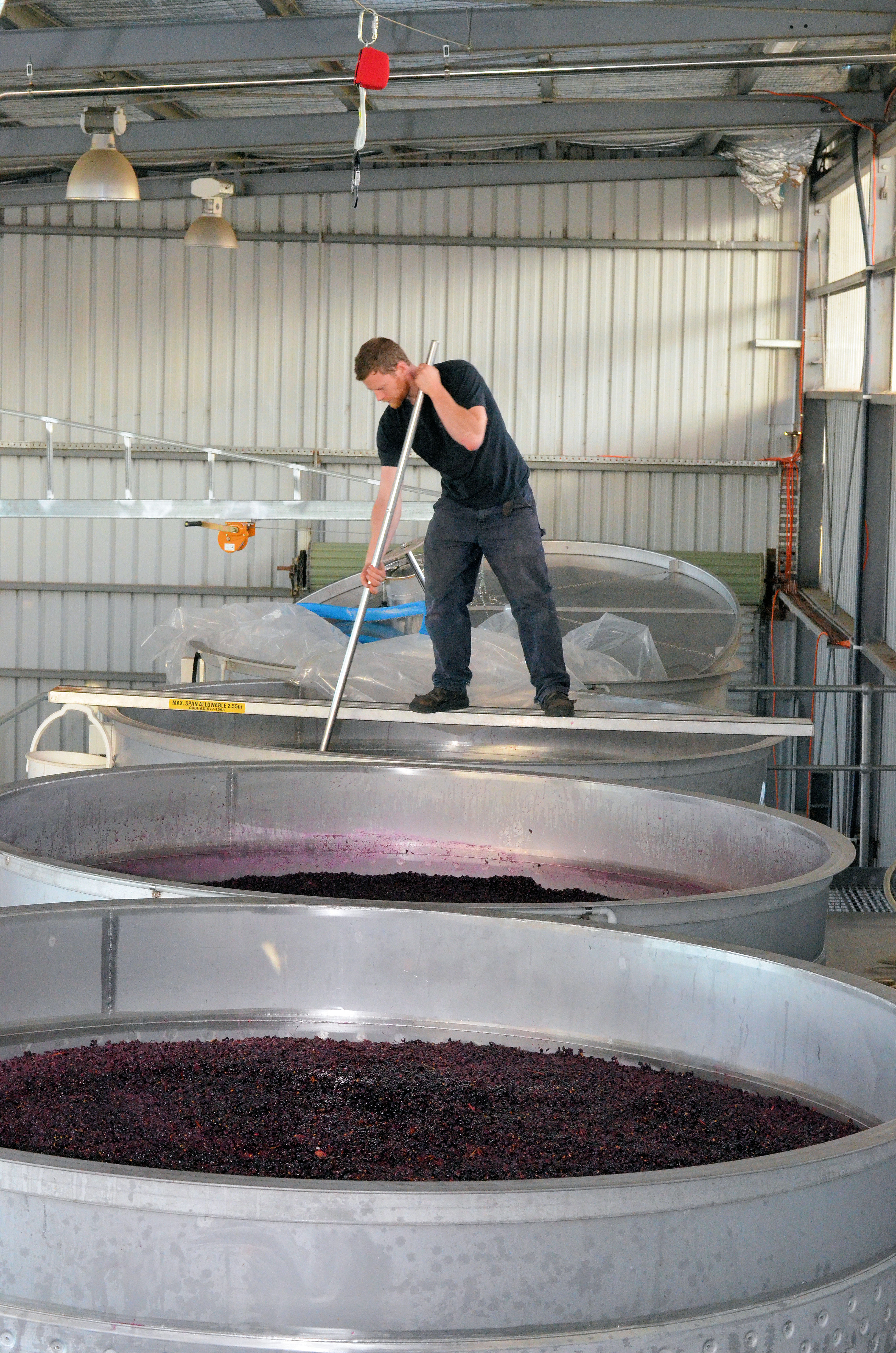 Unterstoßen des Tresterhutes